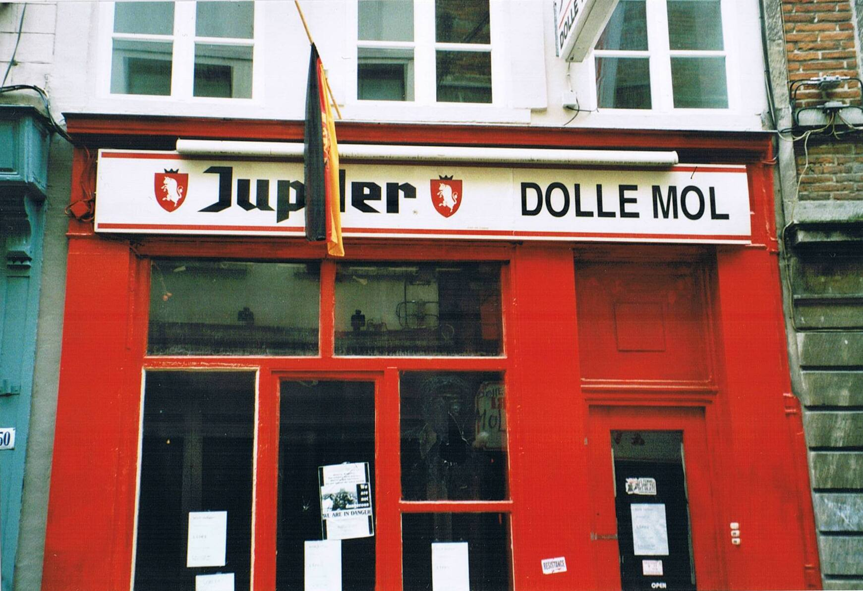 Café Dolle Mol à Bruxelles